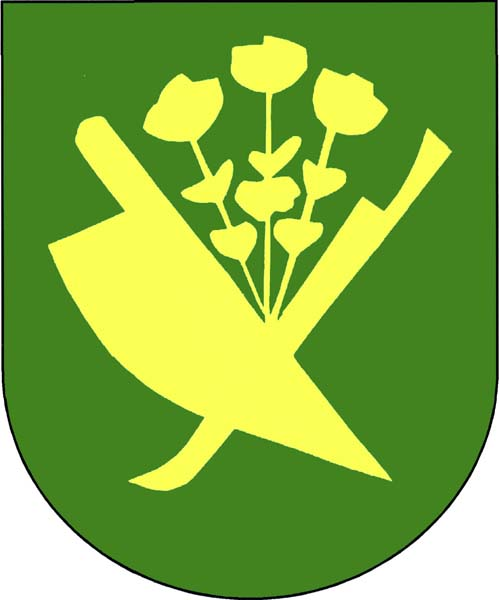 Vlajka obce Zátor